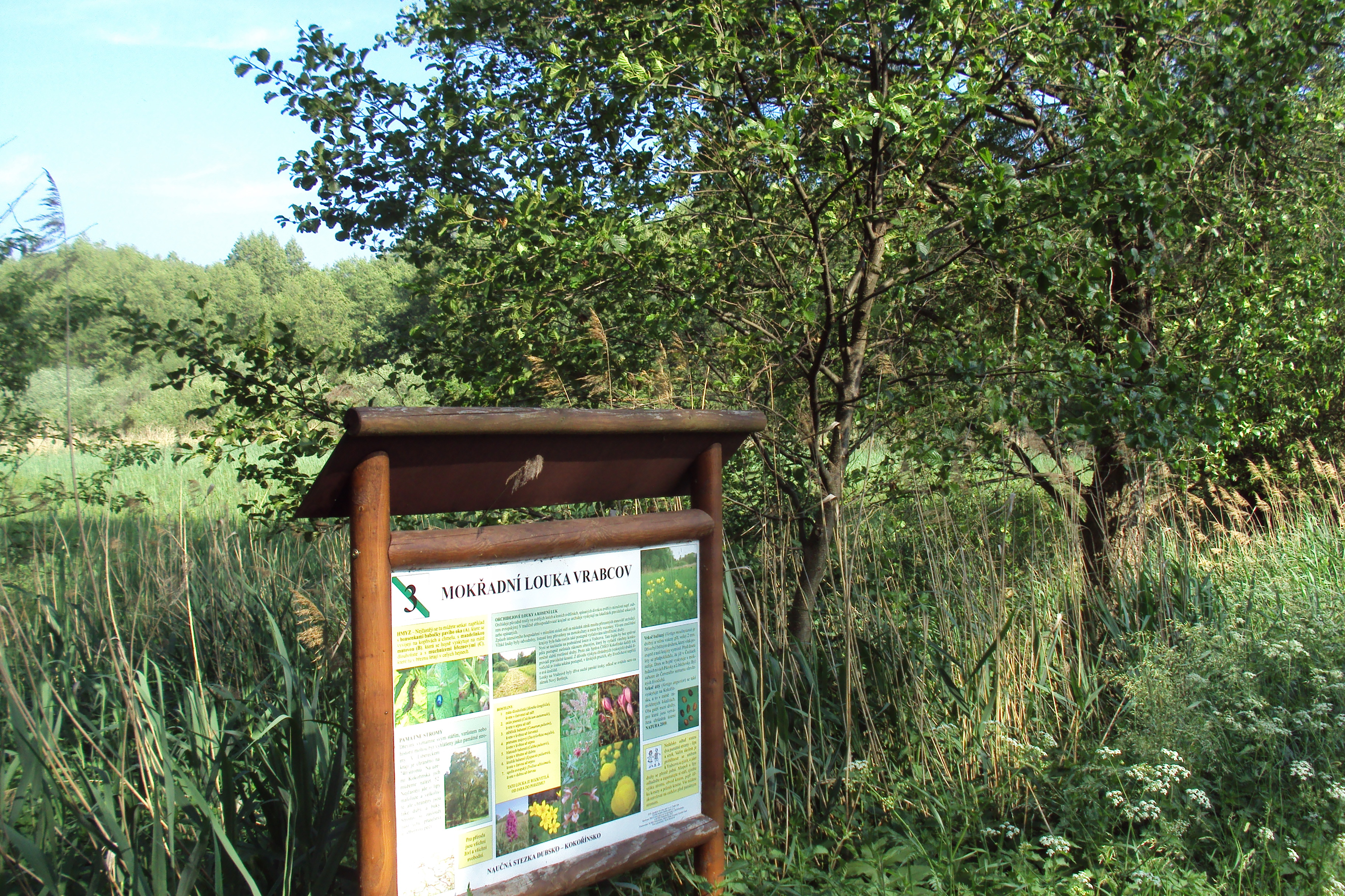 Naučná stezka u osady Vrabcov u obce Deštná, u rezervace Mokřady Horní Liběchovky